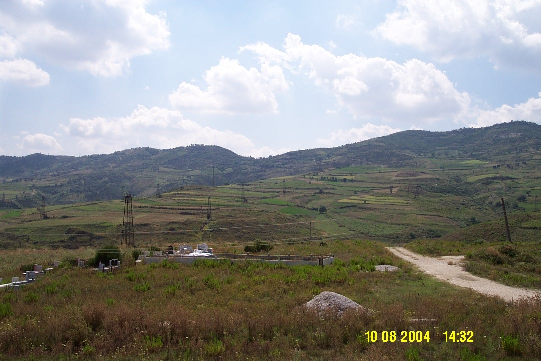 Krajina v Beratském kraji